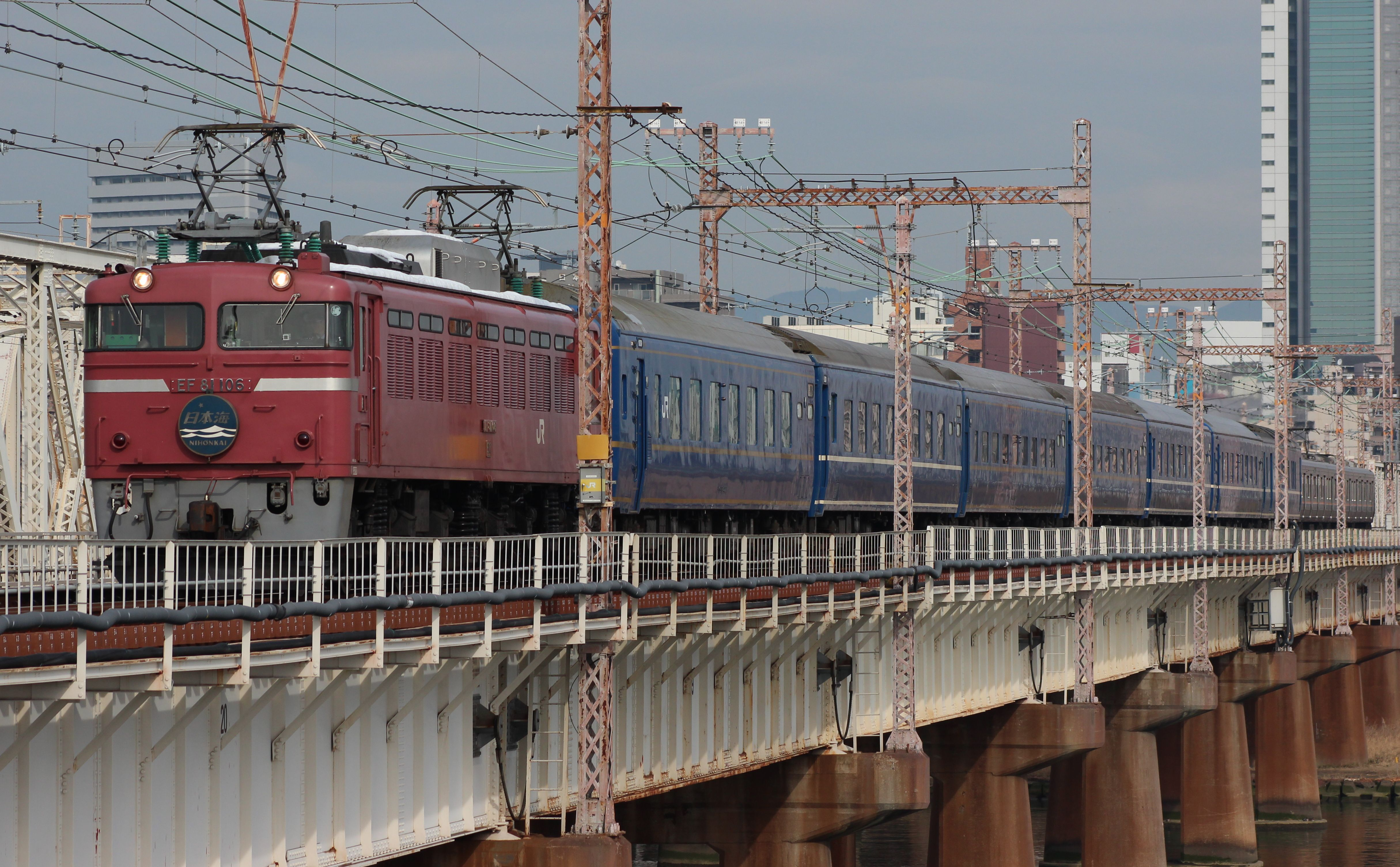 EF81形牽引寝台特急 「日本海」